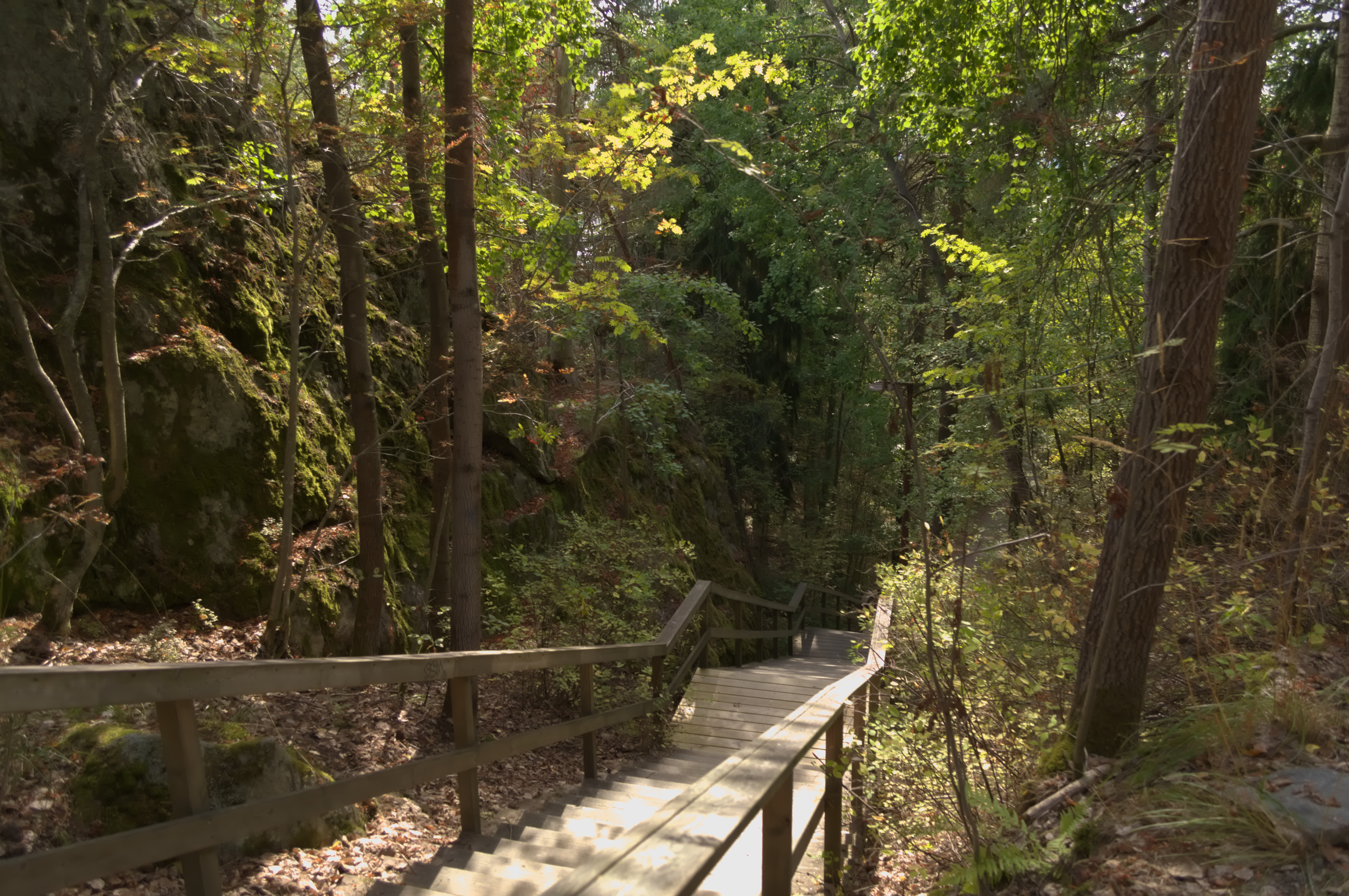 Termopylen sola Pyynikinharjulla Tampereella. Vasemmalla oleva kallio tunnetaan Nimikalliona.